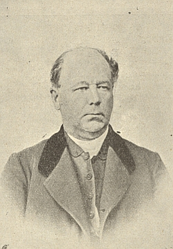 Karl Placidus Hammer (1815 - 1898), Český pedagog a římskokatolický kněz.